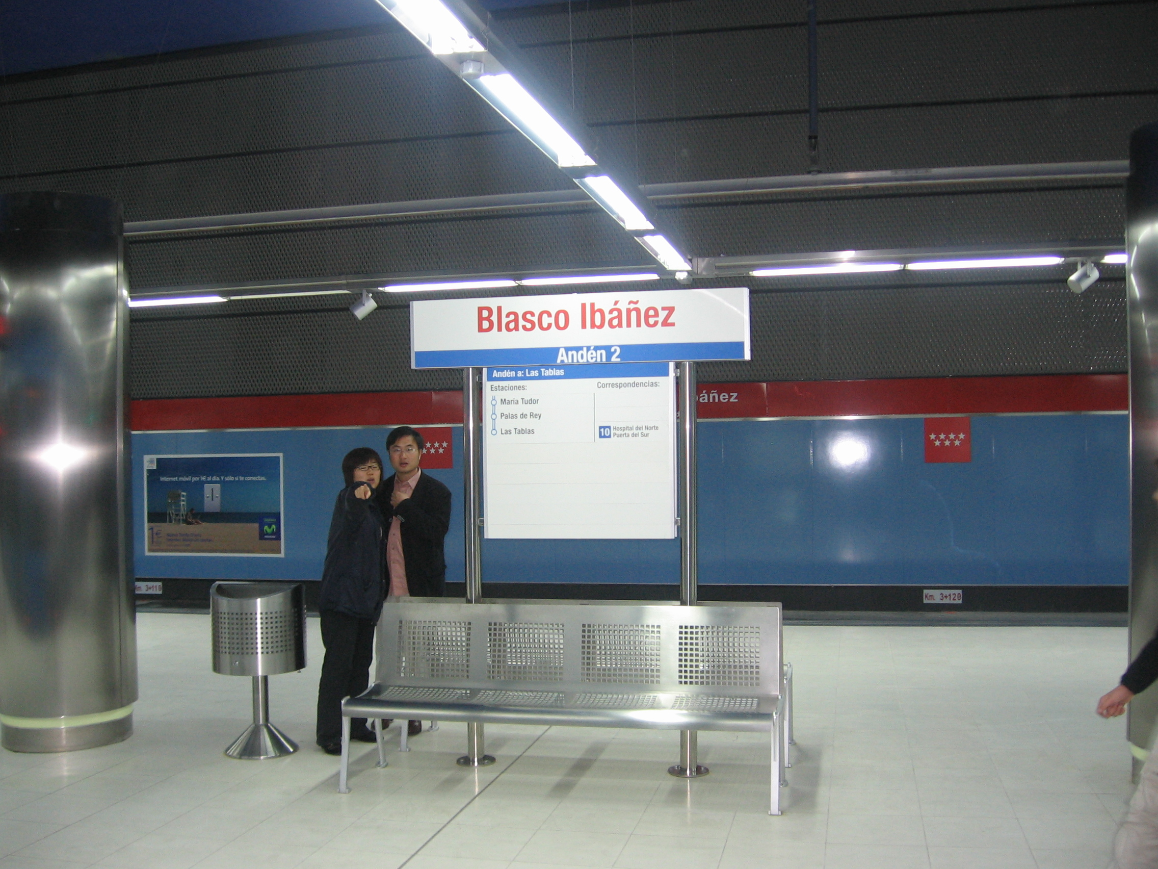 Blasco Ibáñez station in Madrid Light Rail. (The shown people are random people).Estación de Blasco Ibáñez del Metro Ligero de Madrid. (La gente que aparece es casual).